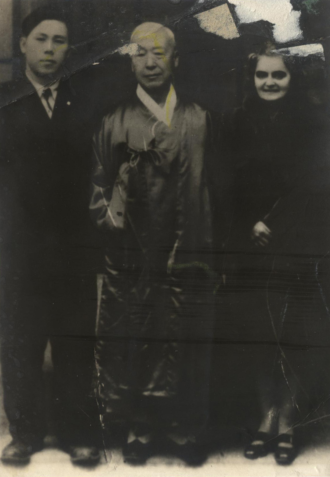 Syngman Rhee, Francesca Donner, Lee Chul-seung in 1948